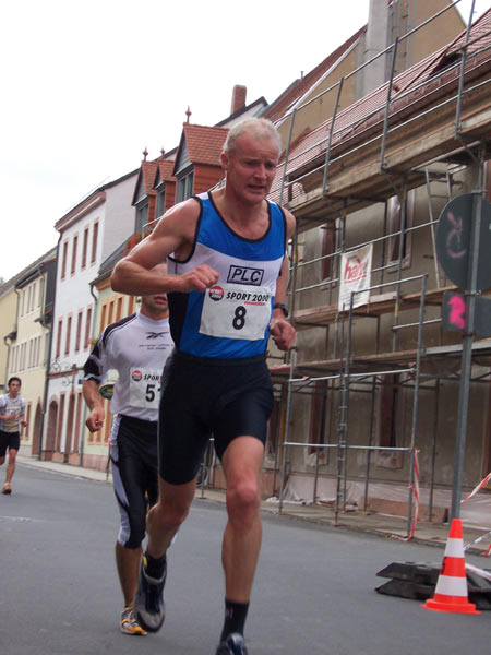 Olaf Beyer über 10 km bei dem Grimmaer Citylauf 2004